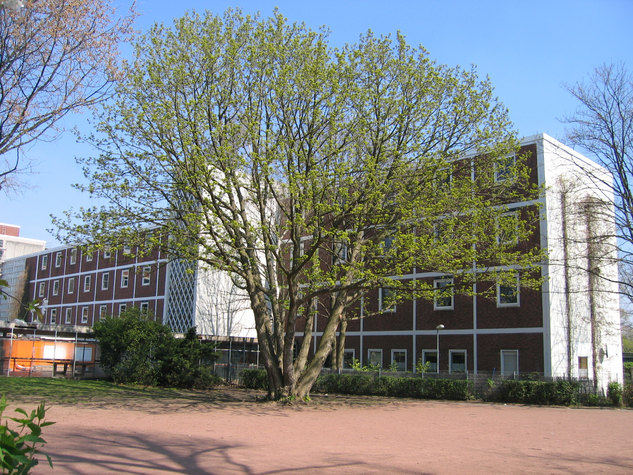 Albertus-Magnus-Gymnasium Köln